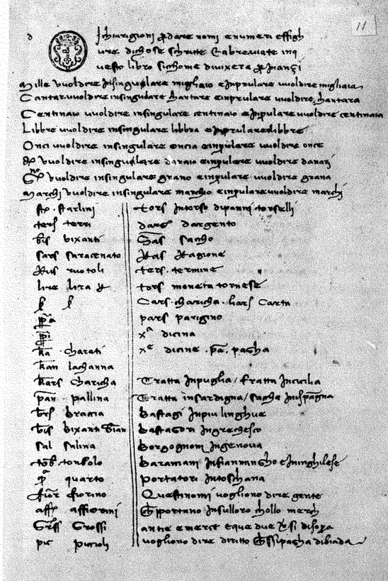 Francesco Balducci Pegolotti, Pratica della mercatura (1472 ms.) f. 11r